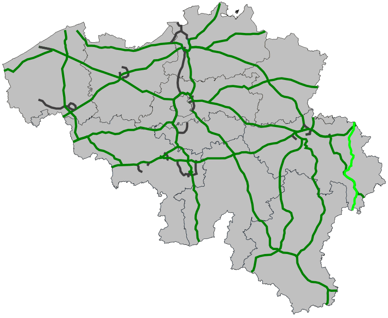 Traject Europese weg 421 door België